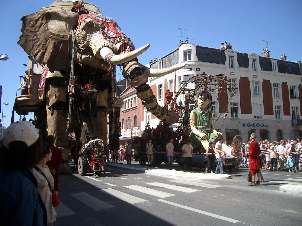 Fête dans la ville 2005. L'éléphant et la petite géante du Royal de Luxe dans les rues d'Amiens en juin 2005.